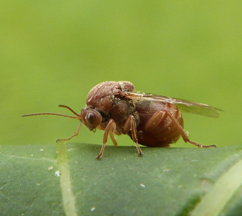 کوردی: sp